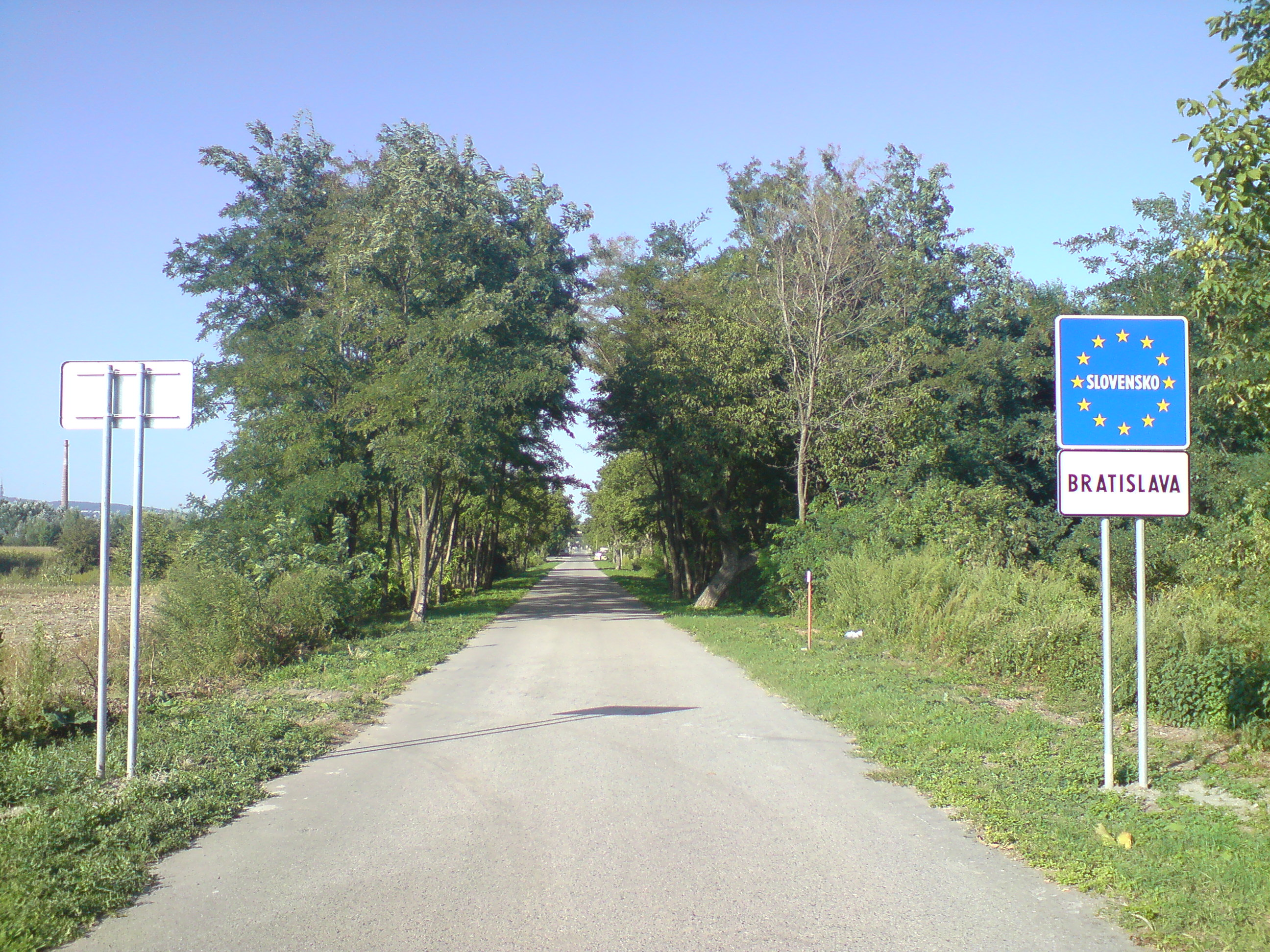 Schengen border between Austria and Slovakia, Kittsee and Petržalka